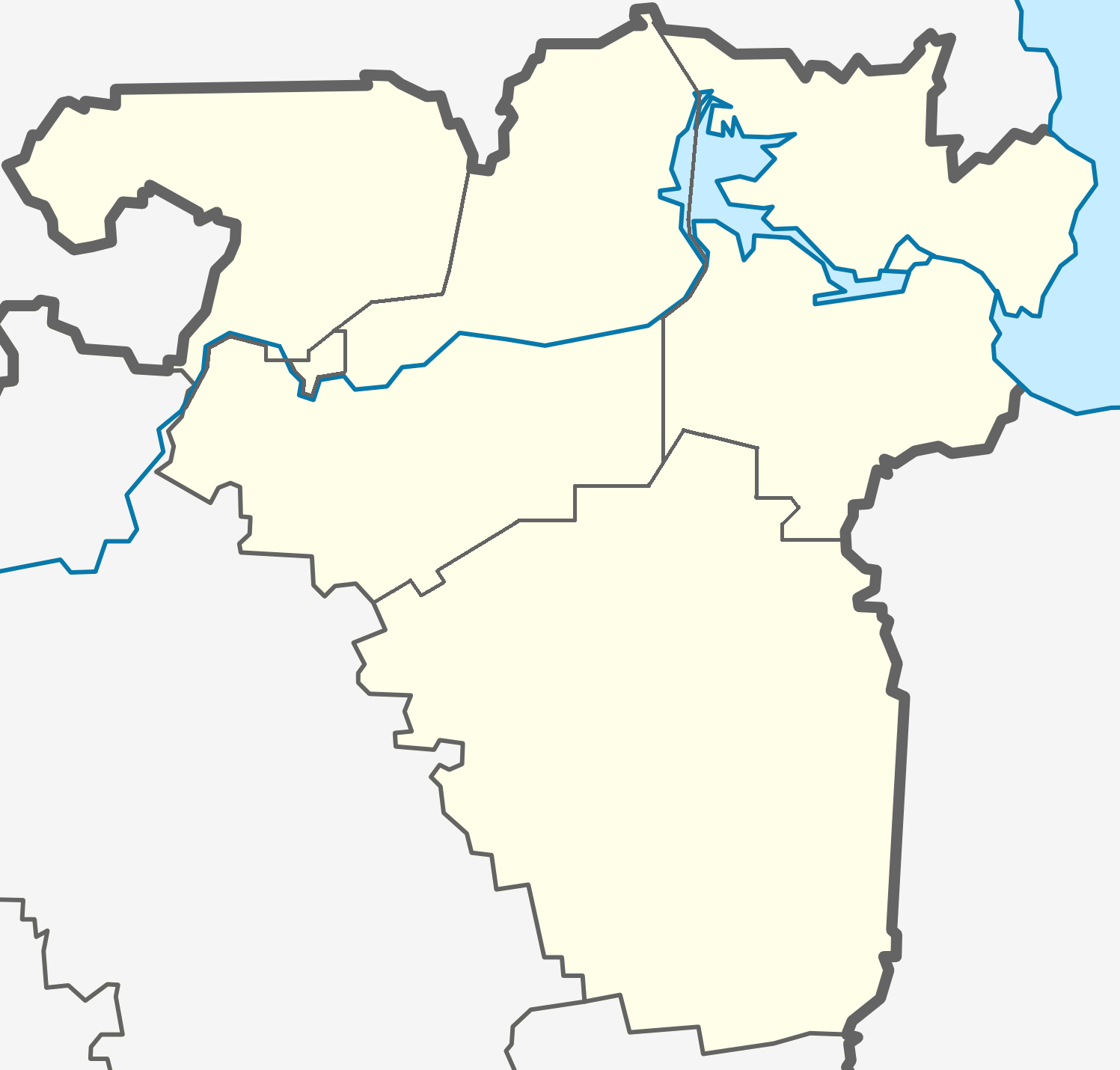 Карта Подпорожского района Ленинградской области с делением на муниципальные образования.